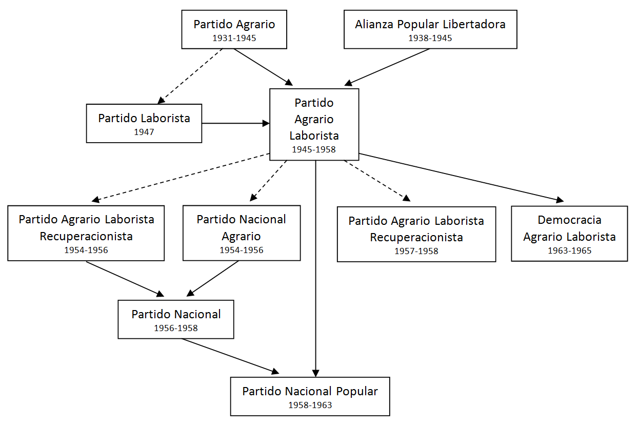 Esquema que muestra las relaciones históricas entre los partidos agrarios y laboristas de mediados del siglo XX en Chile, poniendo énfasis en la formación del Partido Agrario Laborista y sus consecutivas escisiones y reagrupamientos.